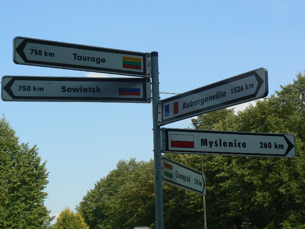 Znak kierujący na miasta partnerskie w Bełchatowie